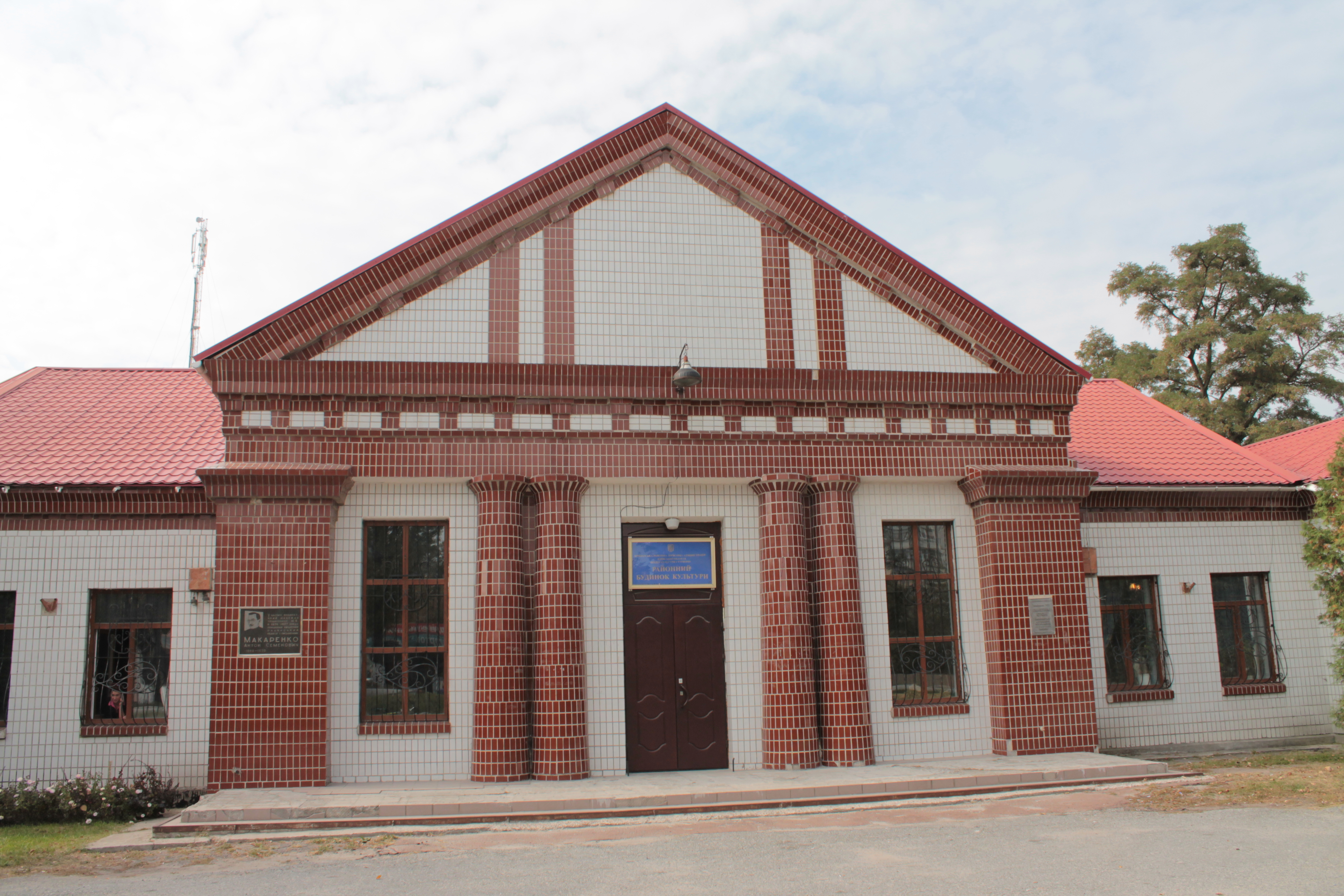 В 1936-1937 годах этот дом принадлежал трудколонии №5, в которой работал выдающийся советский педагог и писатель Макаренко Антон Семенович 1888-1939